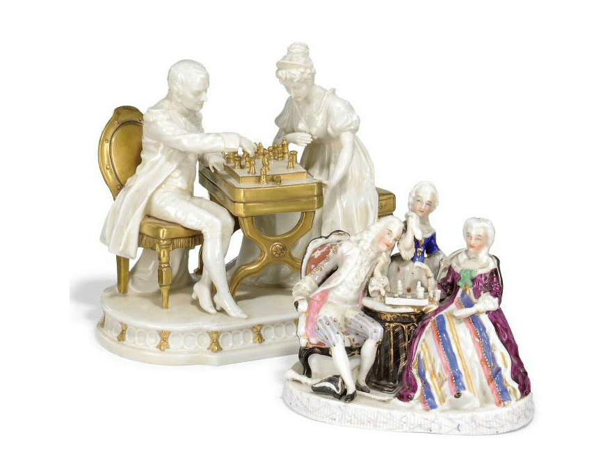 A. W .Fr. Kister Porzellanmanufaktur (1863-1905). Napoleon & Josephine Bonaparte playing chess.